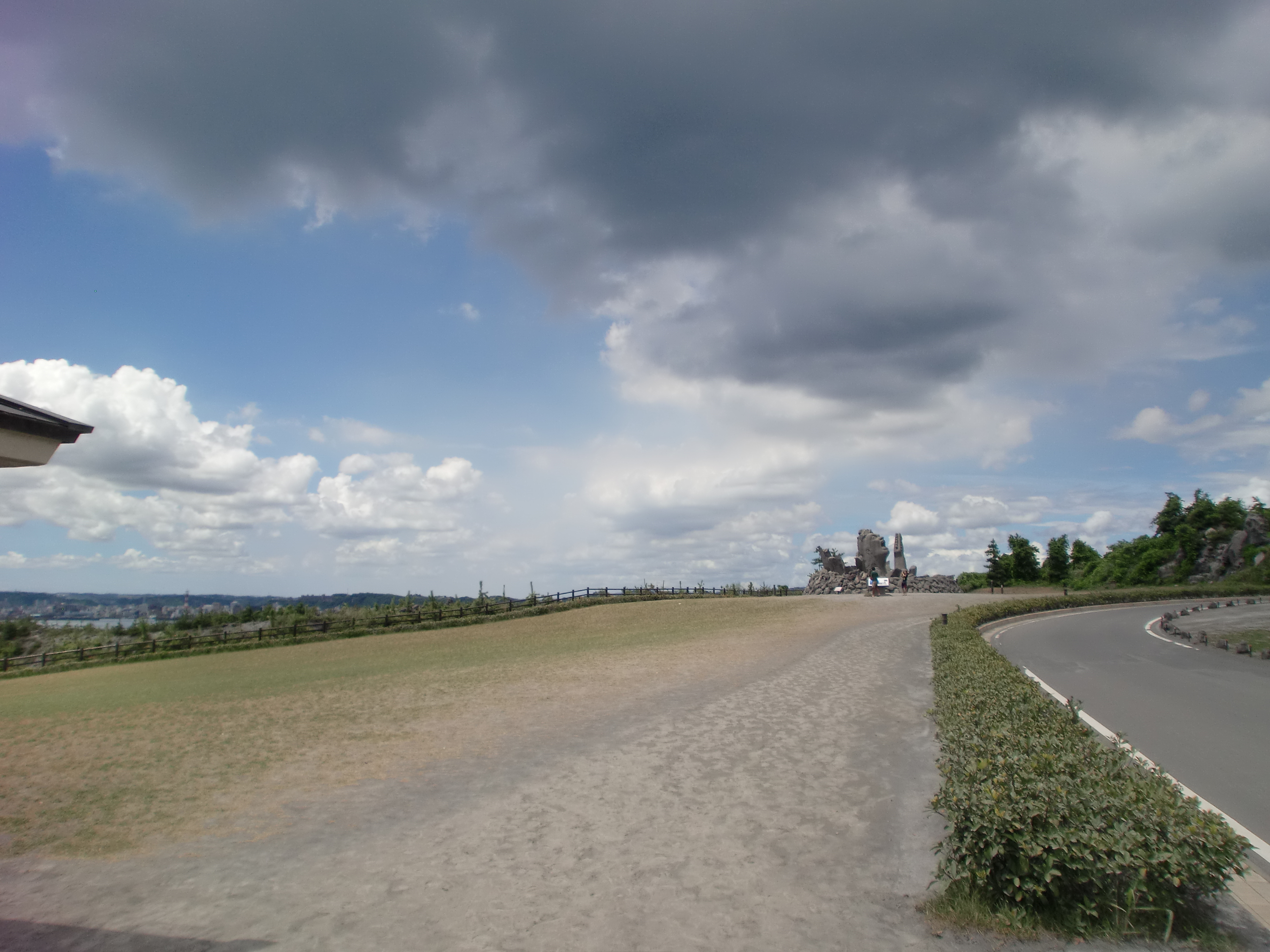 桜島赤水町にある赤水展望広場の画像。右奥には長渕剛の「叫びの肖像」が見える